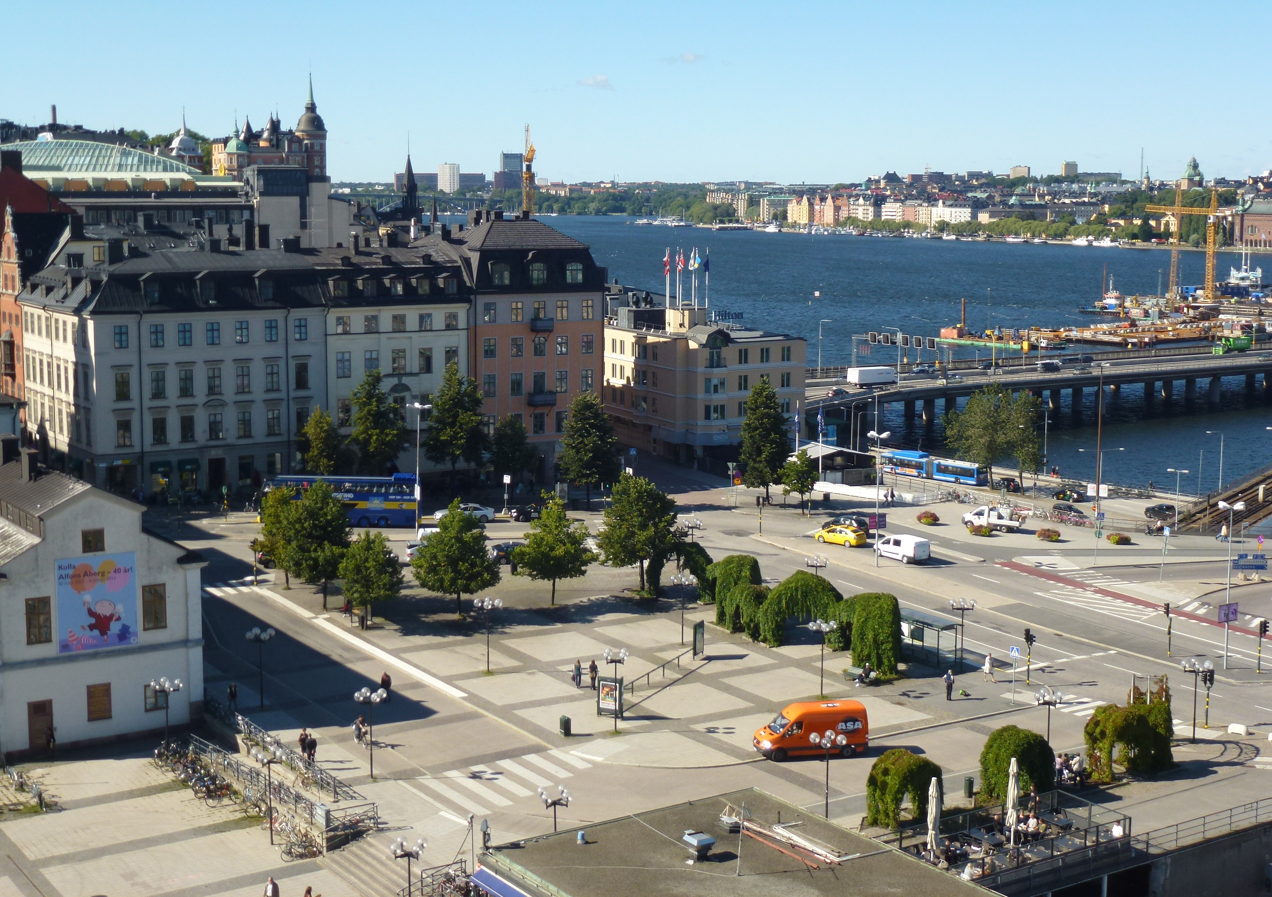 Södermalmstorg från Katarinahissen